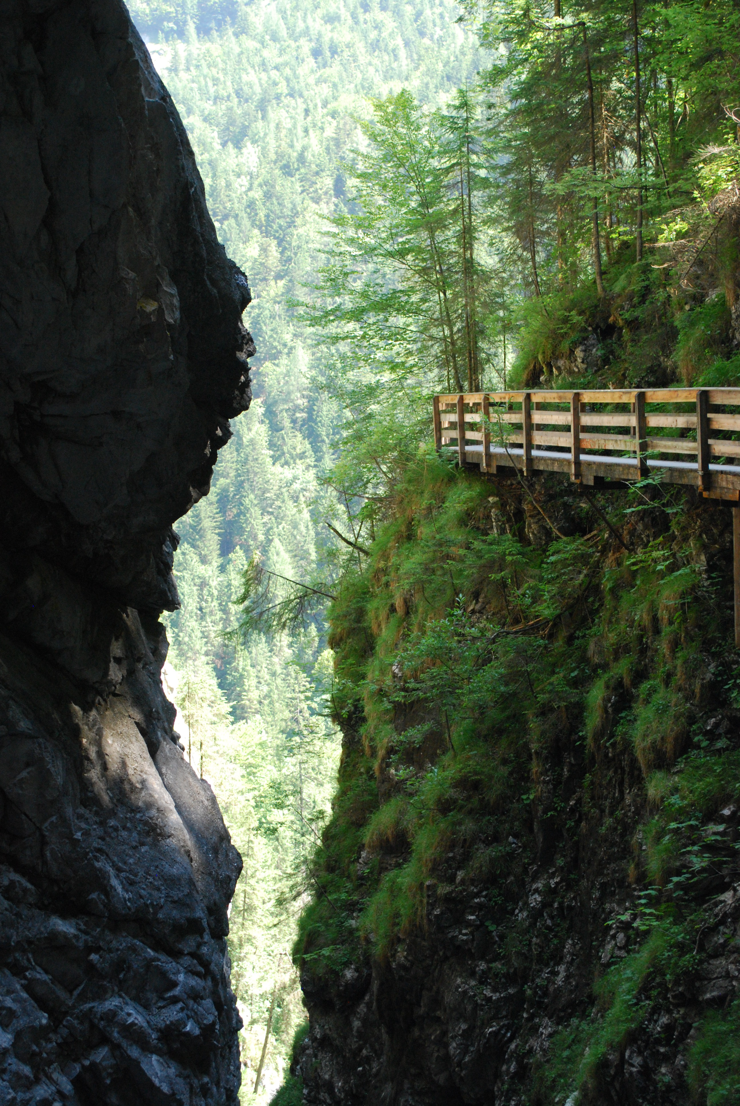 Vordenkaserklamm Sankt Martin